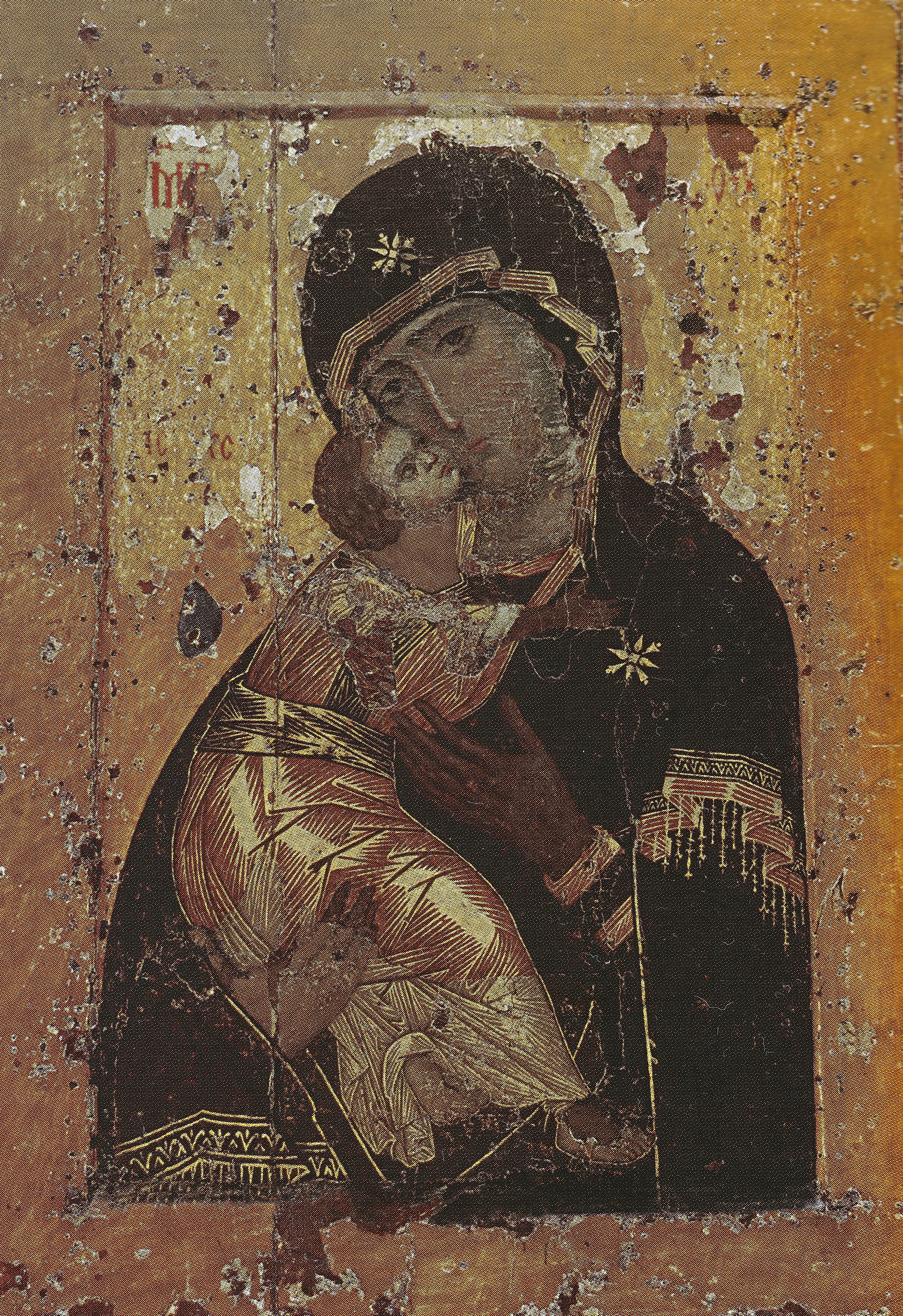 أيقونة عذراء فلاديمير